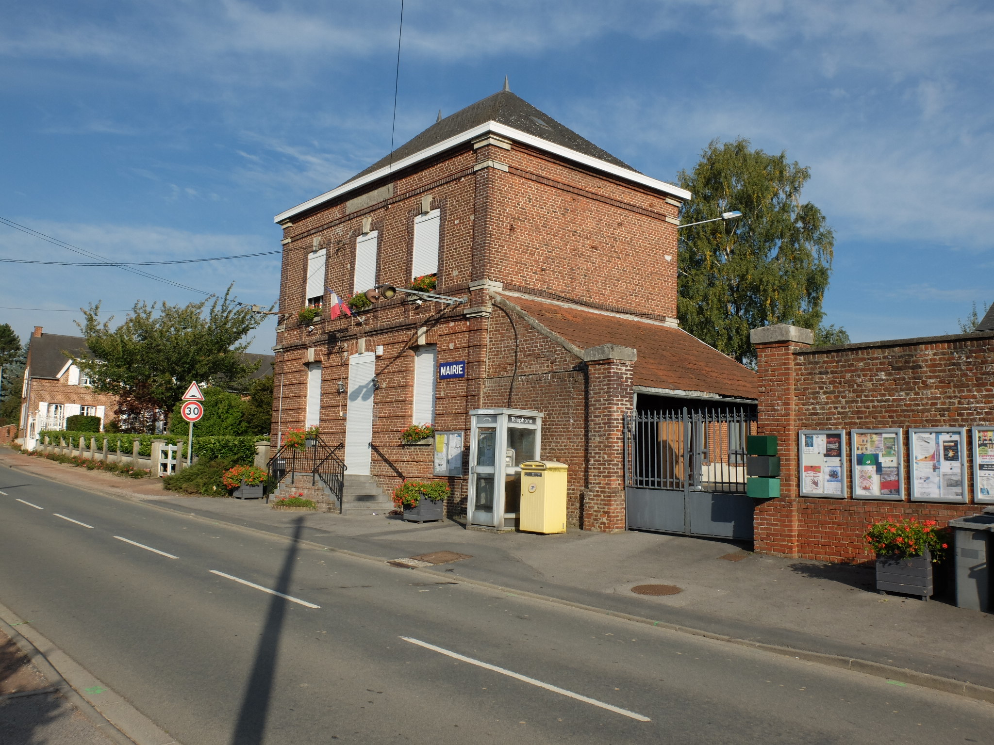 Vue de la mairie de Villereau (Nord) située dans le hameau d'Herbignies.